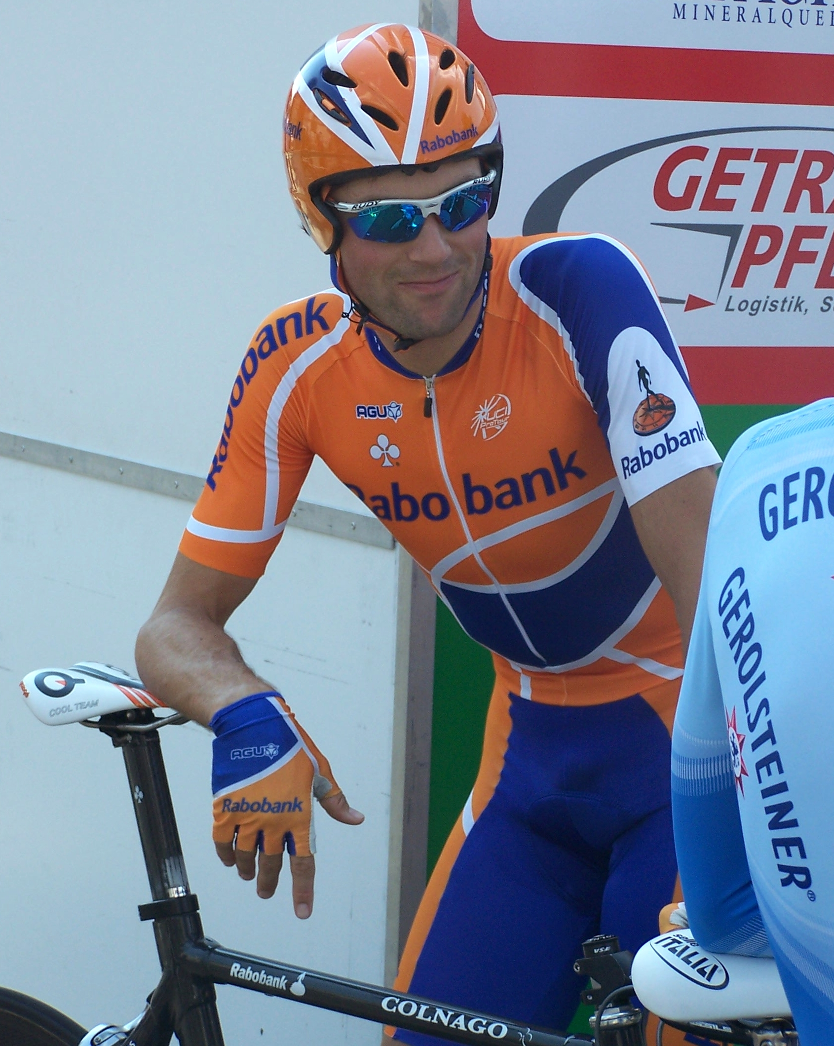 Die Aufnahme entstand beim Einzelzeitfahren der Sachsen-Tour 2008 in Großenhain